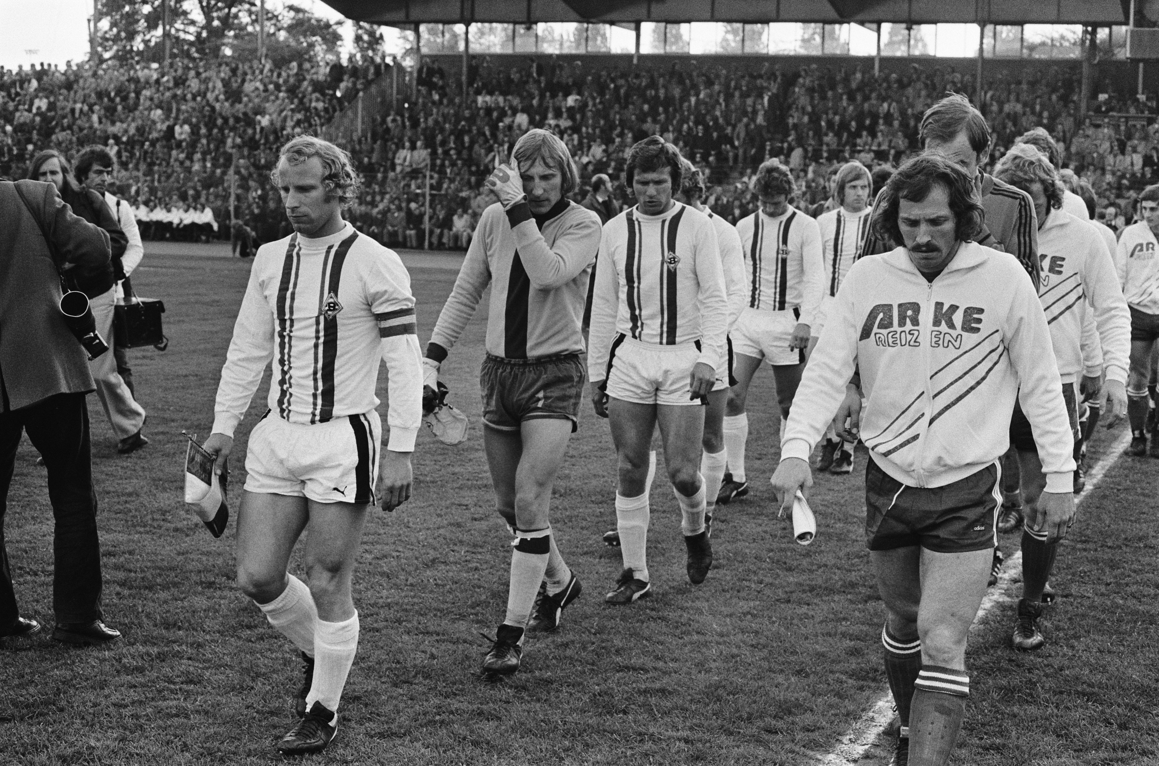 Collectie / Archief : Fotocollectie Anefo Reportage / Serie : FC Twente-Borussia Mönchengladbach 1-5 (returnwedstrijd finale Europa Cup 3) Beschrijving : Spelers betreden het veld Datum : 21 mei 1975 Locatie : Enschede, Overijssel Trefwoorden : spelers, sport, voetbal Fotograaf : Fotograaf Onbekend / Anefo Auteursrechthebbende : Nationaal Archief Materiaalsoort : Negatief (zwart/wit) Nummer archiefinventaris : bekijk toegang 2.24.01.05 Bestanddeelnummer : 927-9411